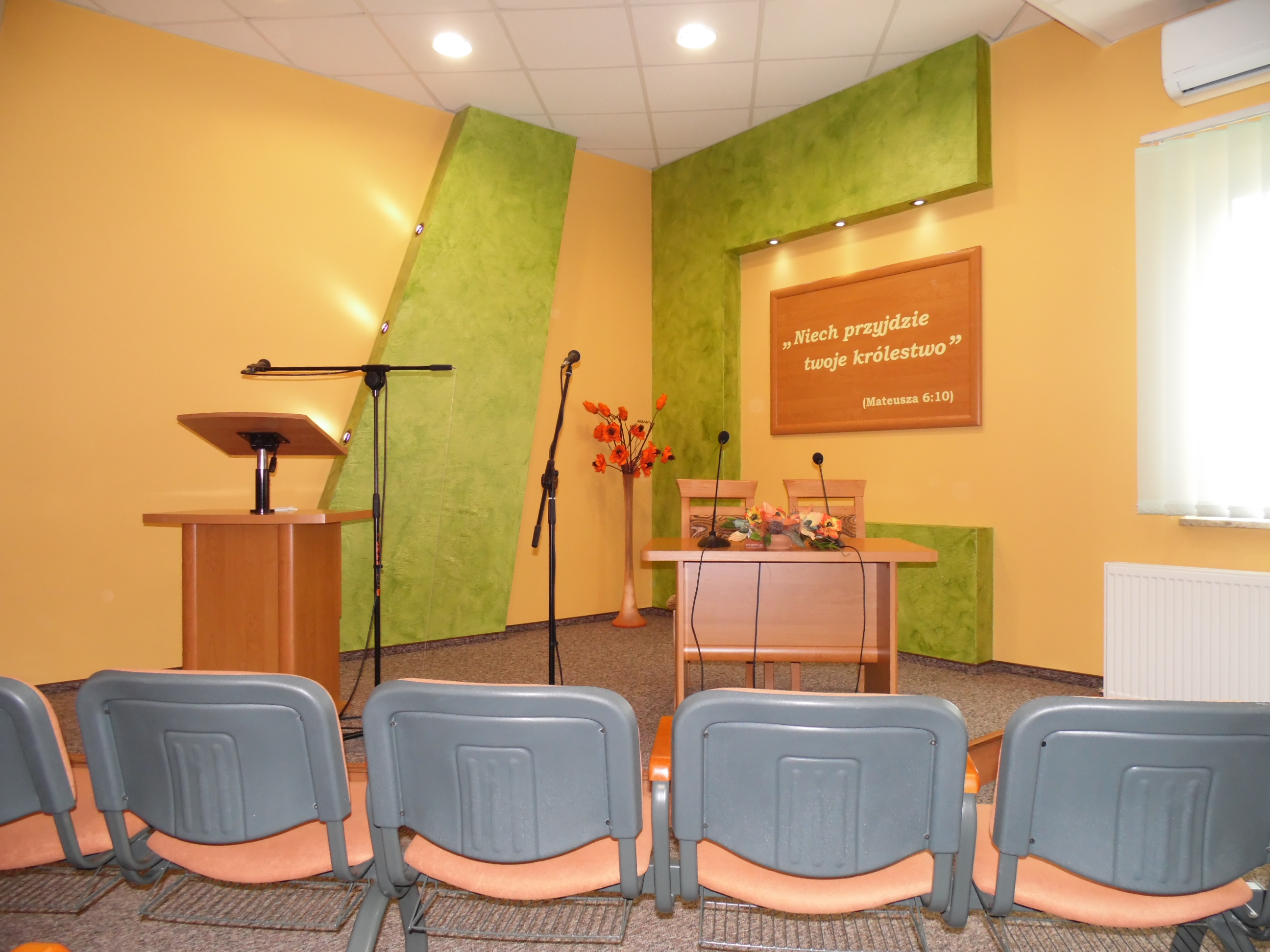 SALA KRÓLESTWA ŚWIADKÓW JEHOWY.